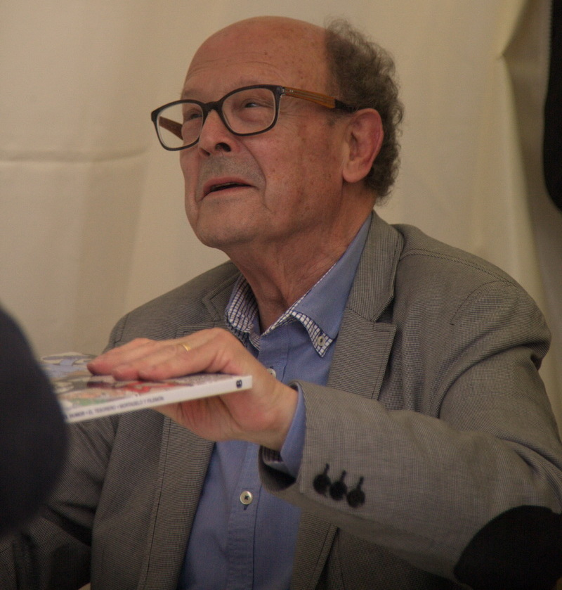 Signatura de llibres en la Diada de Sant Jordi-2015 a Barcelona